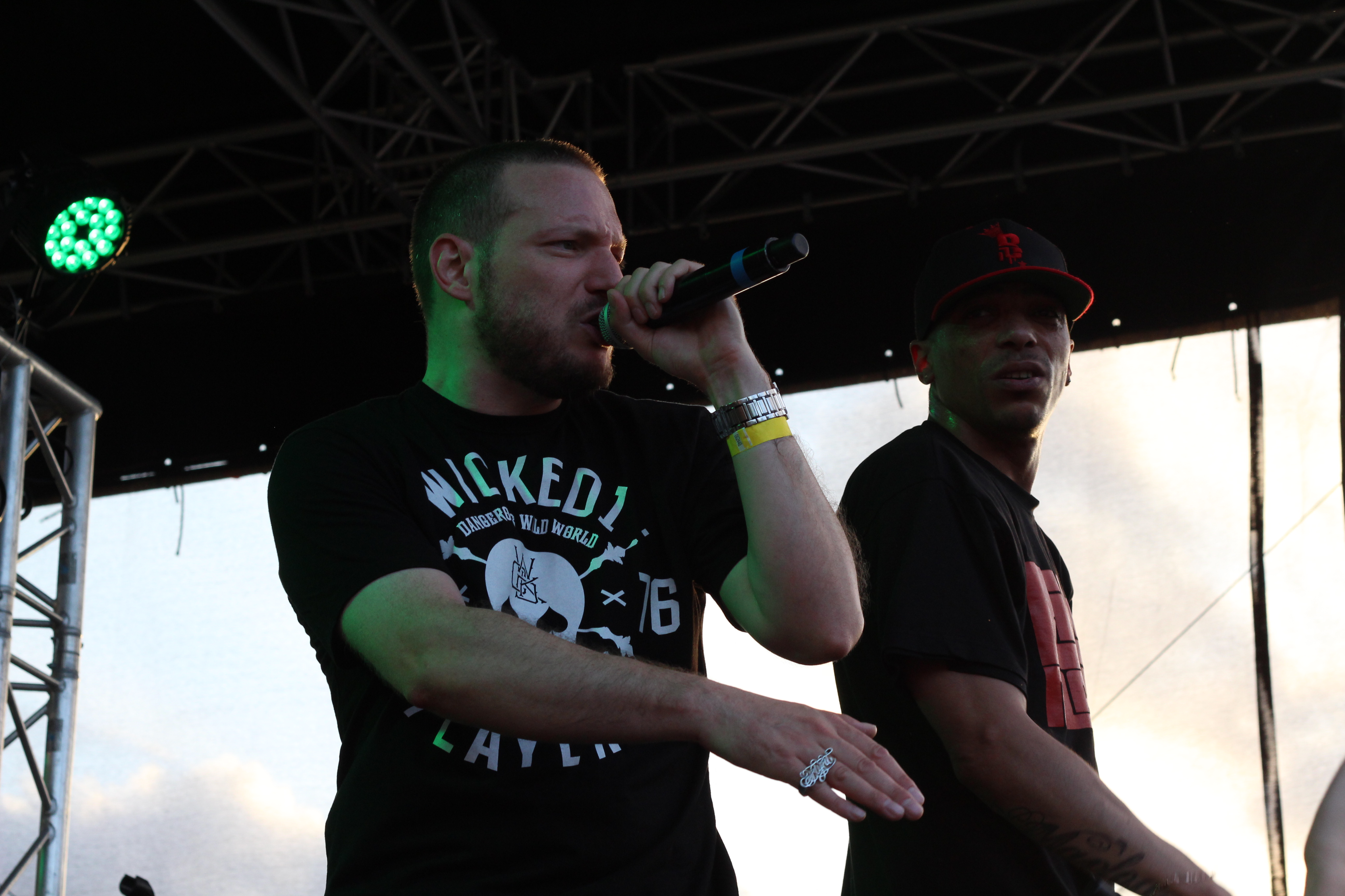 Flynt et Nasme, Live à LaPlage de GlazArt, Festival Paris Hip Hop, Le 4 juillet 2013.